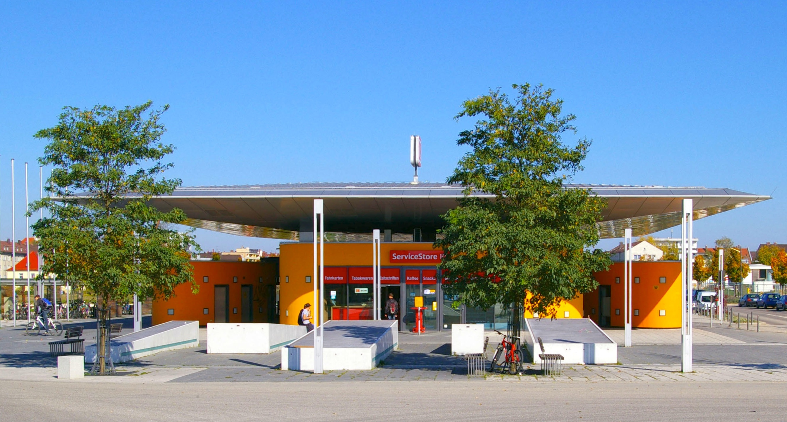 Das nach dem alten Bahnhofsgebäude (ca. 1855 bis ca. 1944), und dem Nachkriegsbau (ca. 1950 bis 2007) nun dritte Bahnhof der Stadt Neu-Ulm.